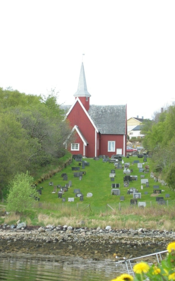 Fillan church, Hitra, Sør-Trøndelag, Norway